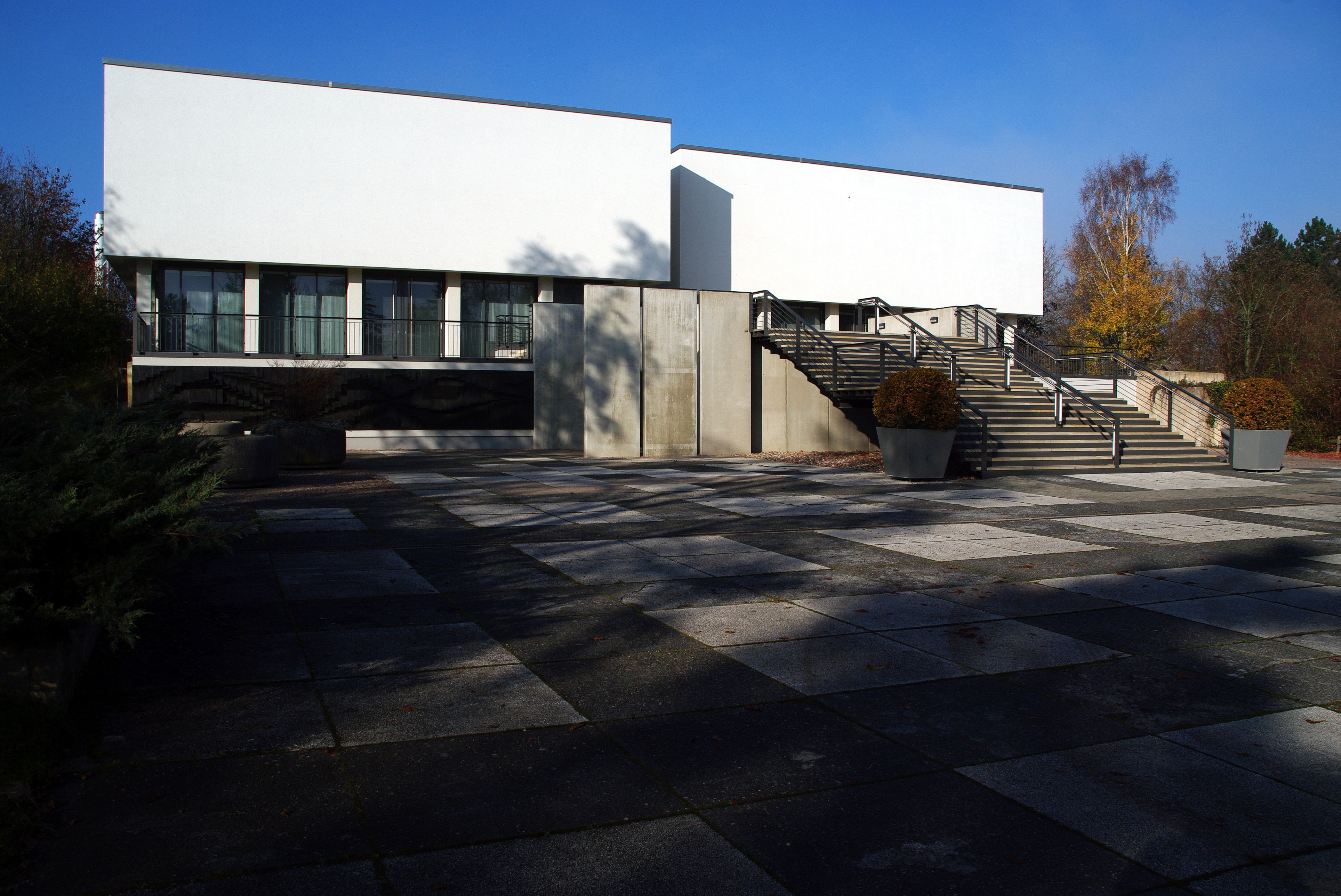 Die Feierhalle auf dem Erfurter Hauptfriedhof.